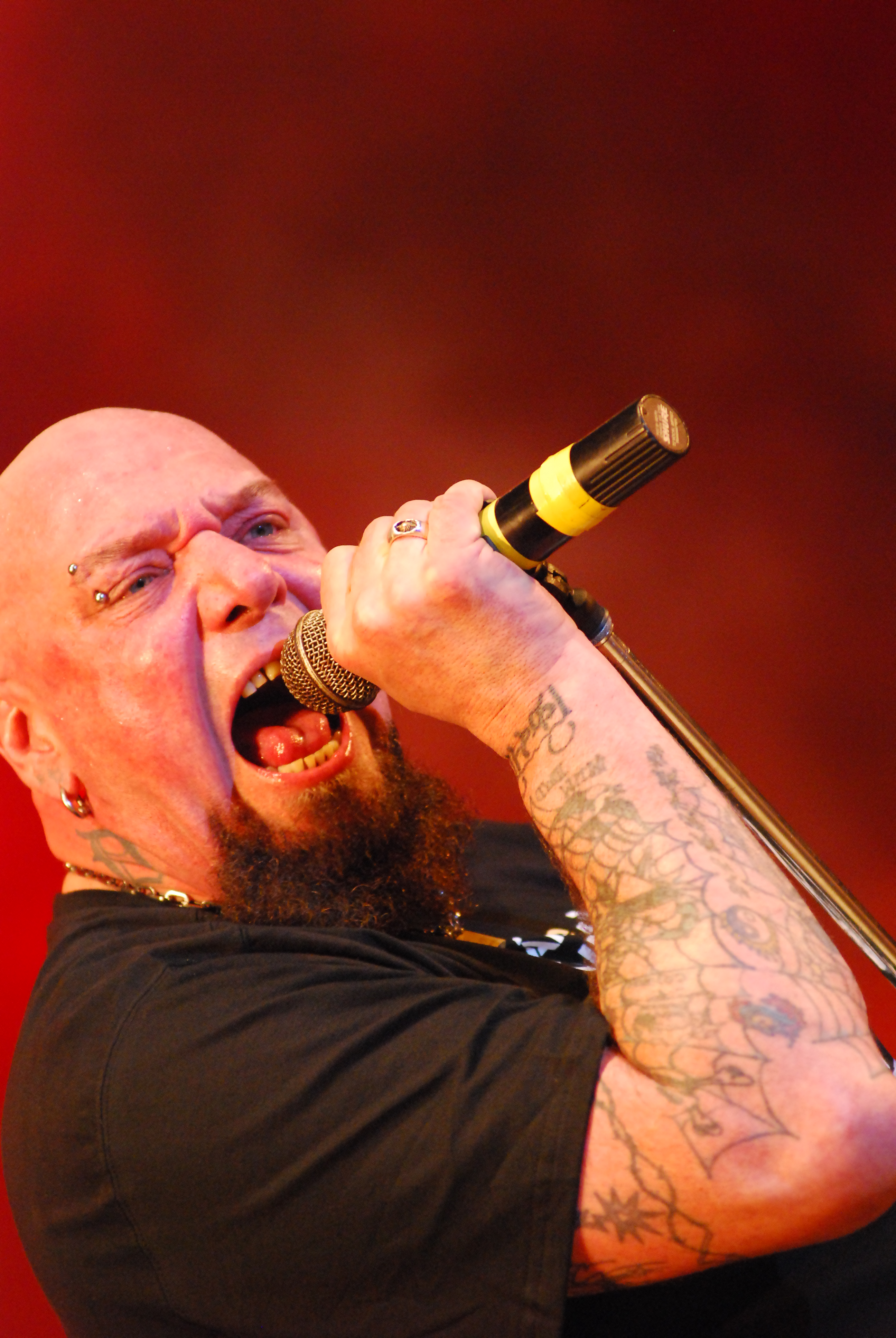 Foto: Silvio Tanaka